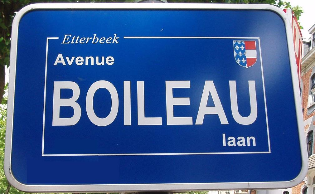 plaque de rue Etterbeek (avenue Boileau) Belgium